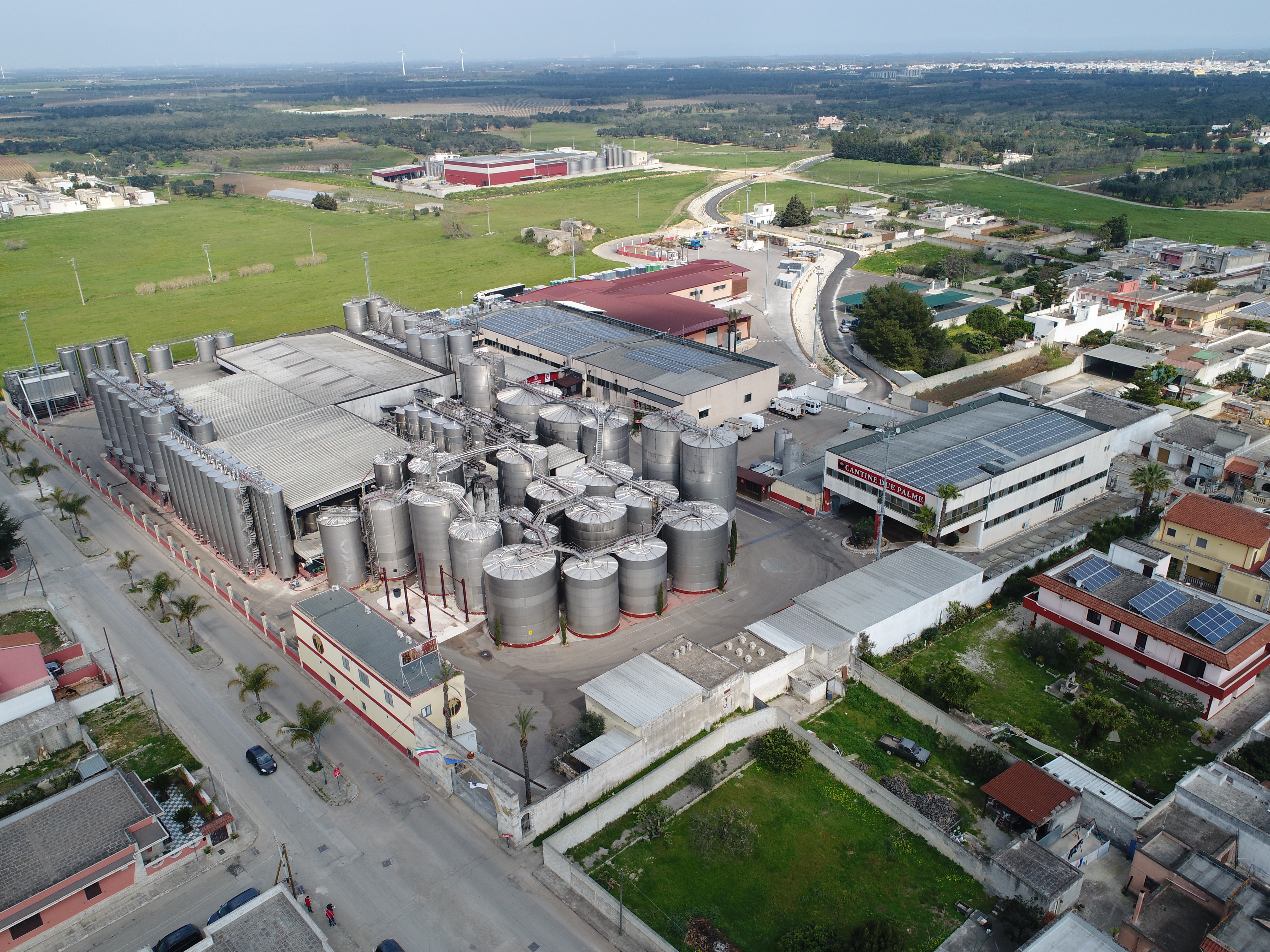 Cantina principale situata a Cellino San Marco